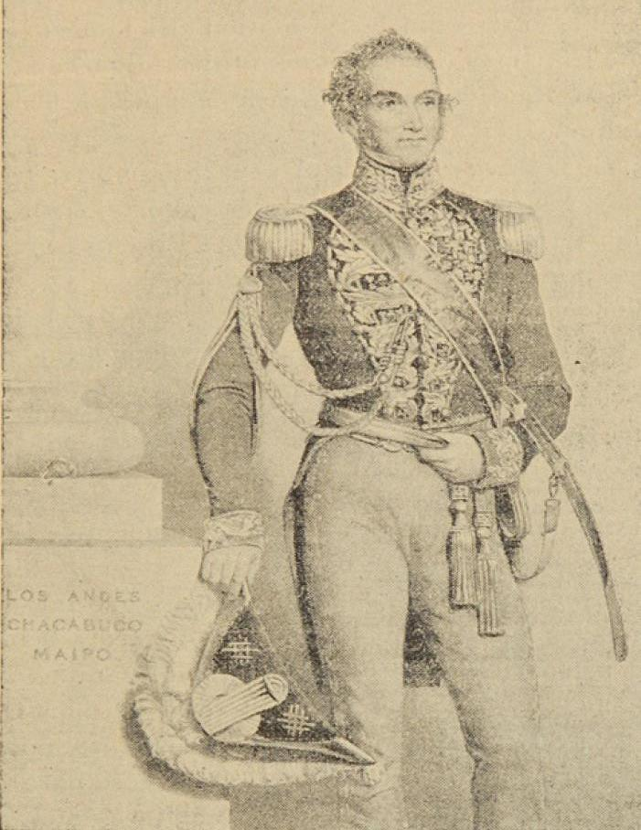 "Jeneral de Brigada Don Juan O´Brien" en Álbum militar de Chile, 1810-1879 de Pedro Pablo Figueroa (1905)